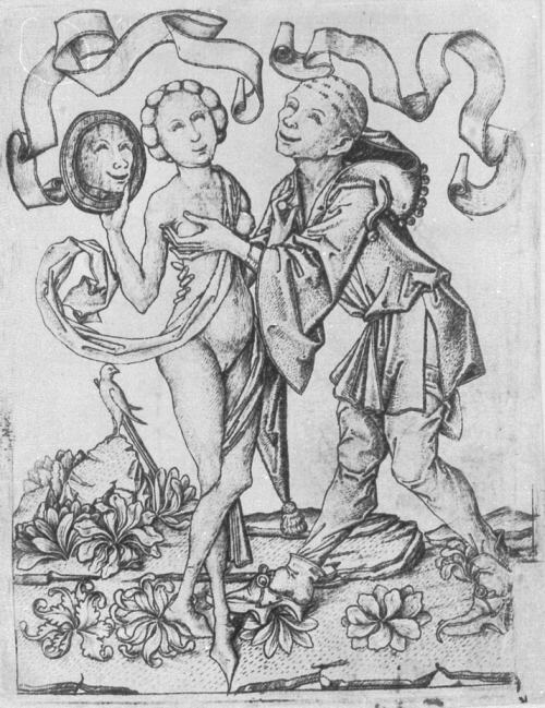 Maitre ES L.213 Fou et jeune fille au miroir (allégorie de la luxure)